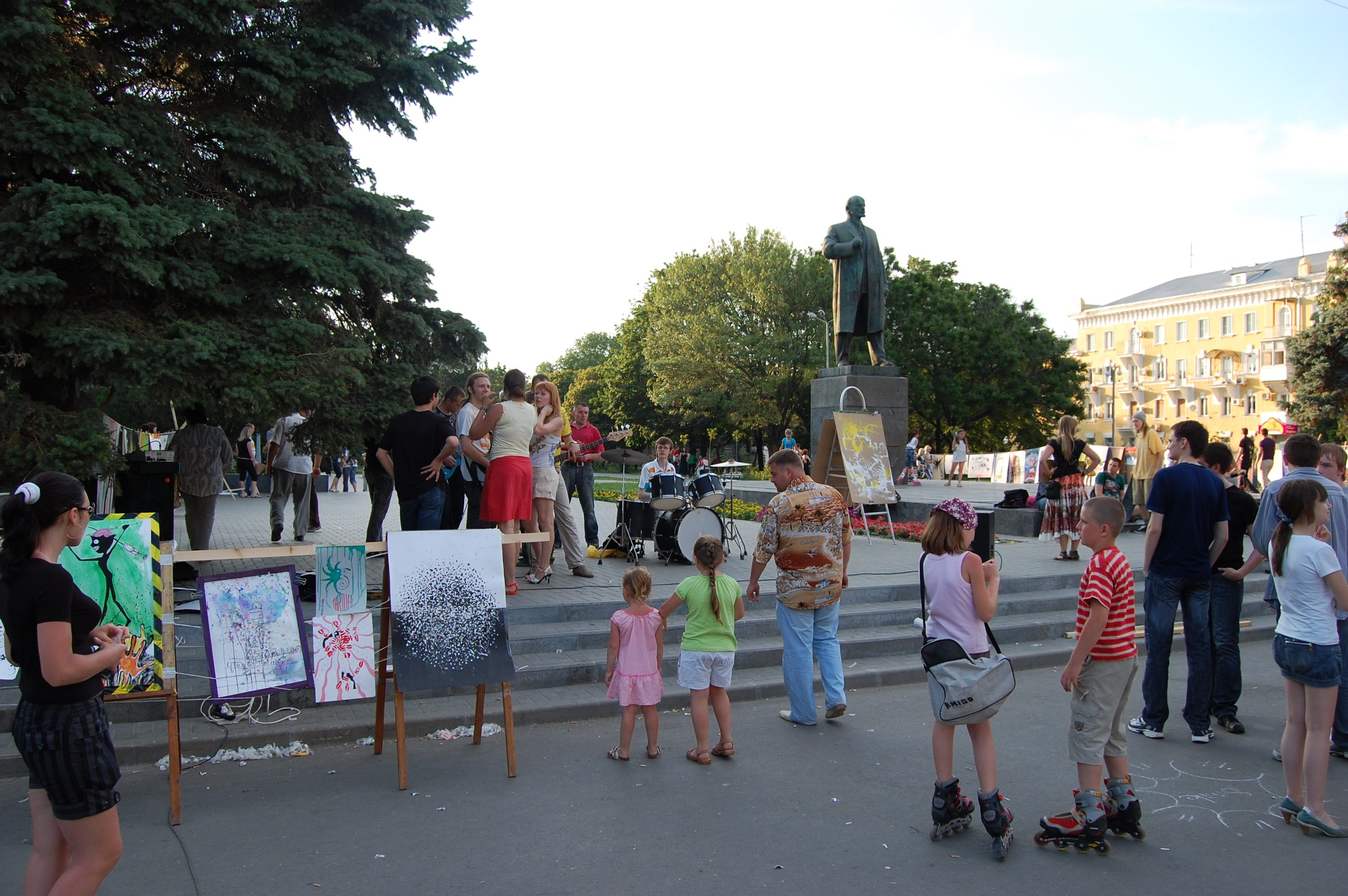 Таганрог, Октябрьская площадь, выставка "Размазывая звуки"